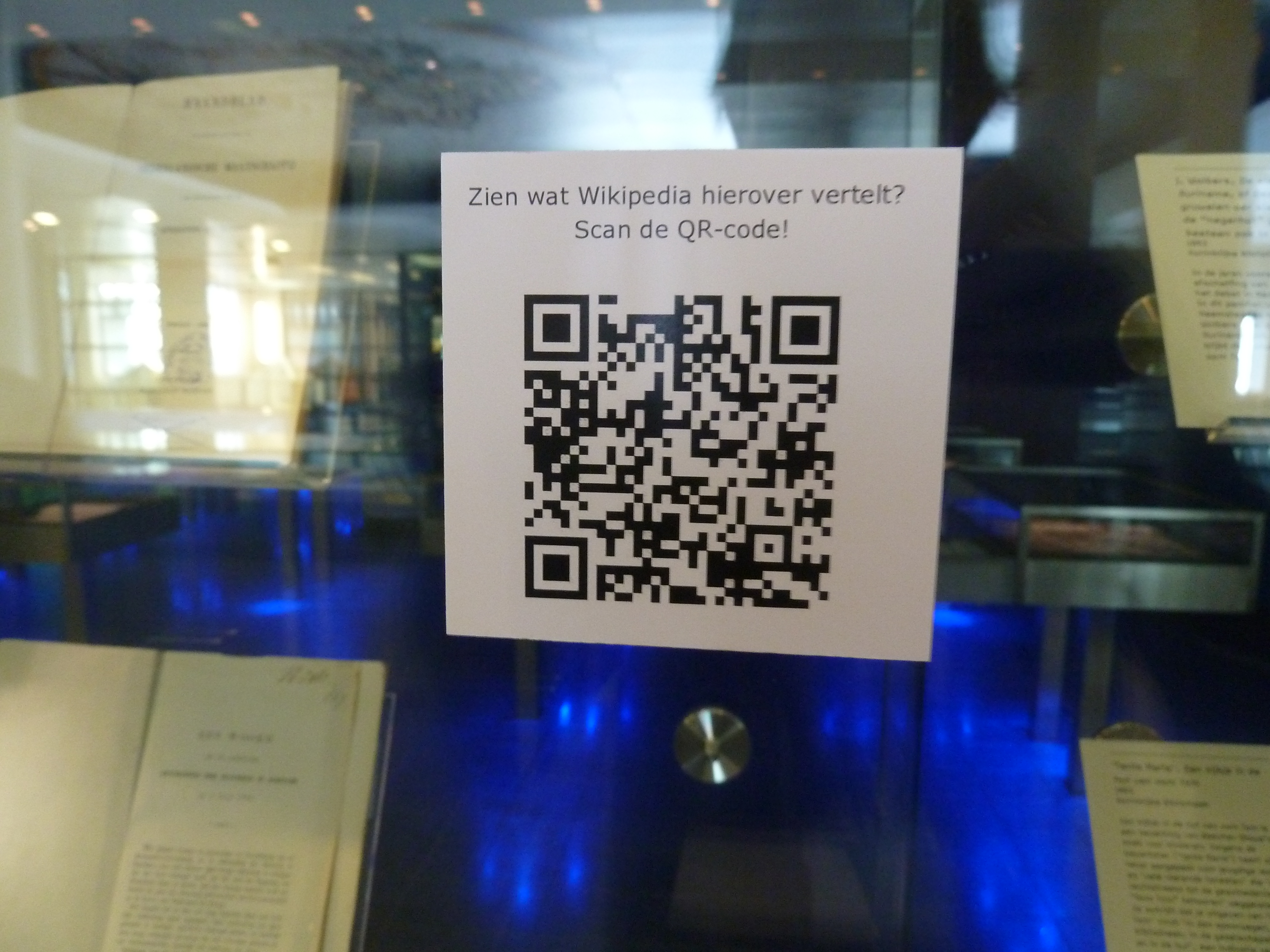 QRpedia code, linkt naar Geschiedenis van de Nederlandse slavernij, in De Verdieping van Nederland, Koninklijke Bibliotheek/Nationaal Archief, Den Haag, Nederland